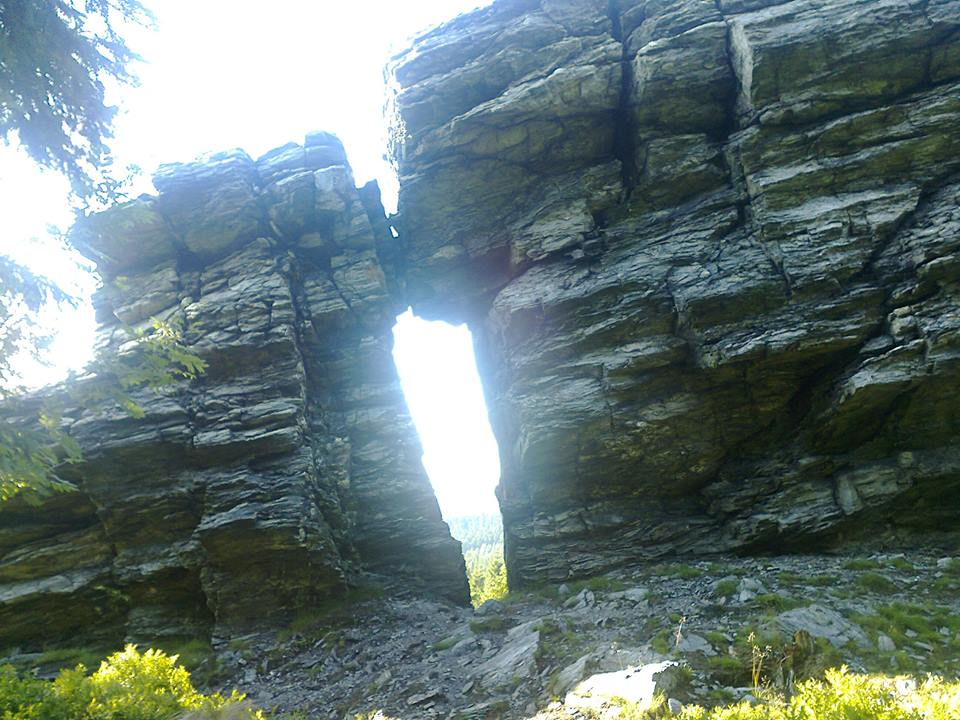 Kamenná vrata